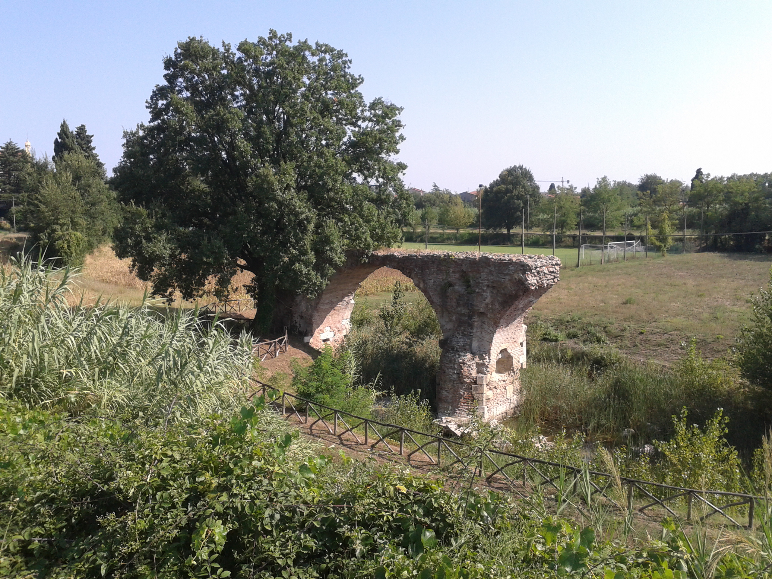 "E puntaz" (in dialetto locale), l'antico ponte romano presso San Vito, vicino Rimini.